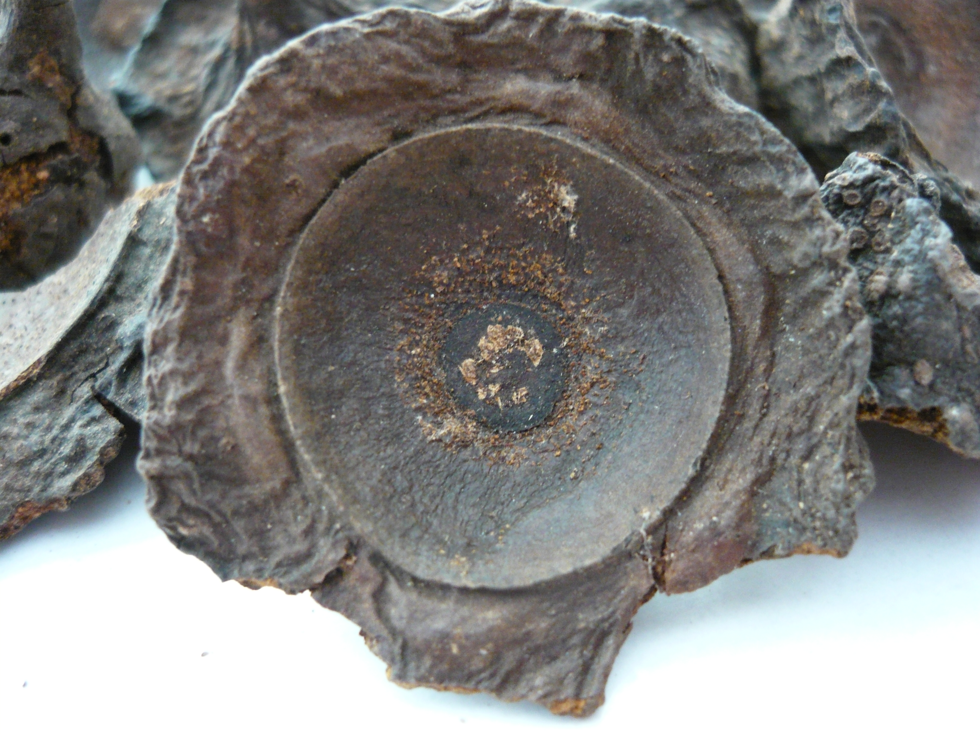 Ocotea quixos, Lauraceae, ishpingo. Cúpulas del fruto usadas en Ecuador para aromatizar bebidas como la Colada Morada.